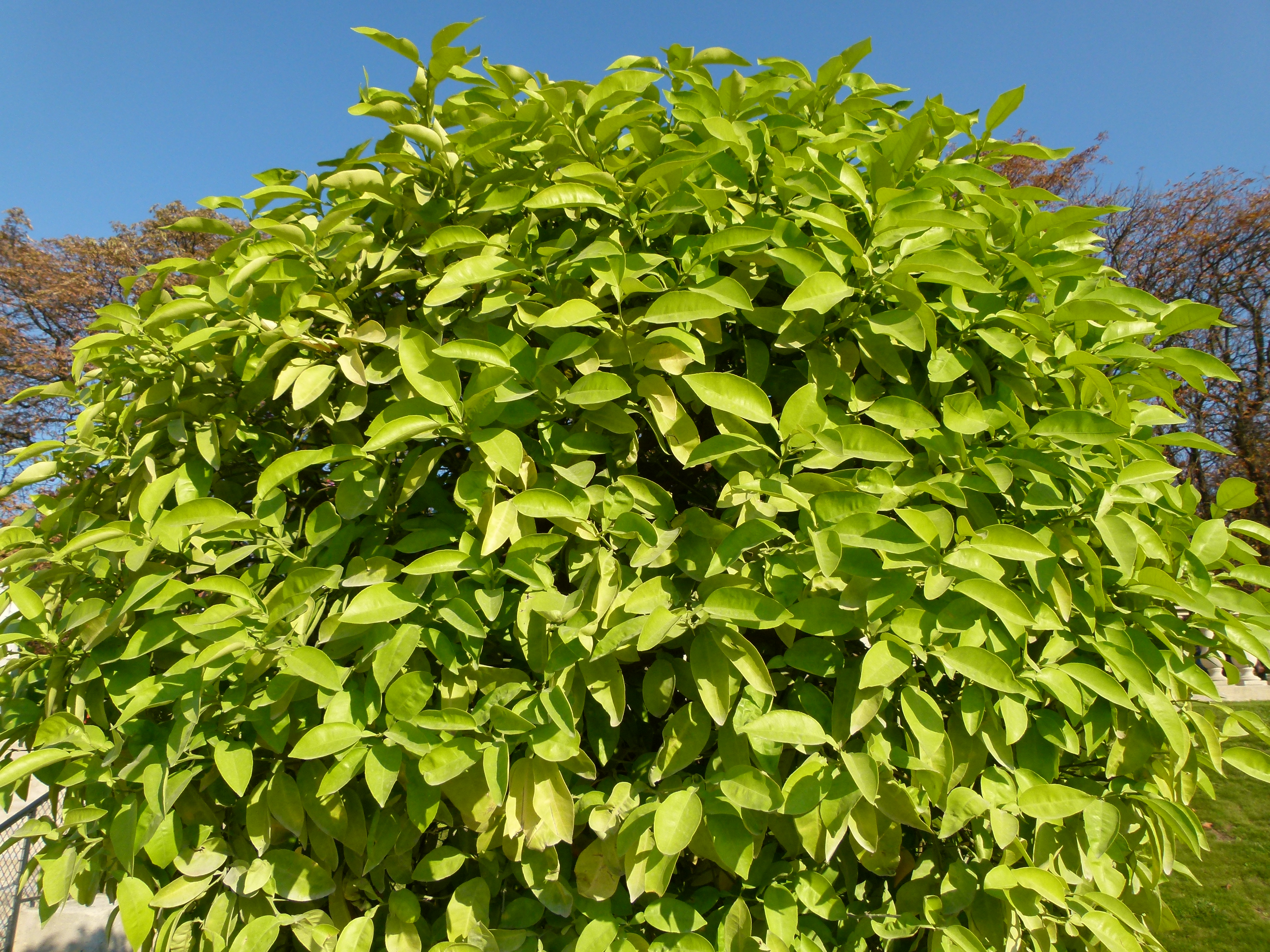 Citrus aurantium Jardin du Luxembourg